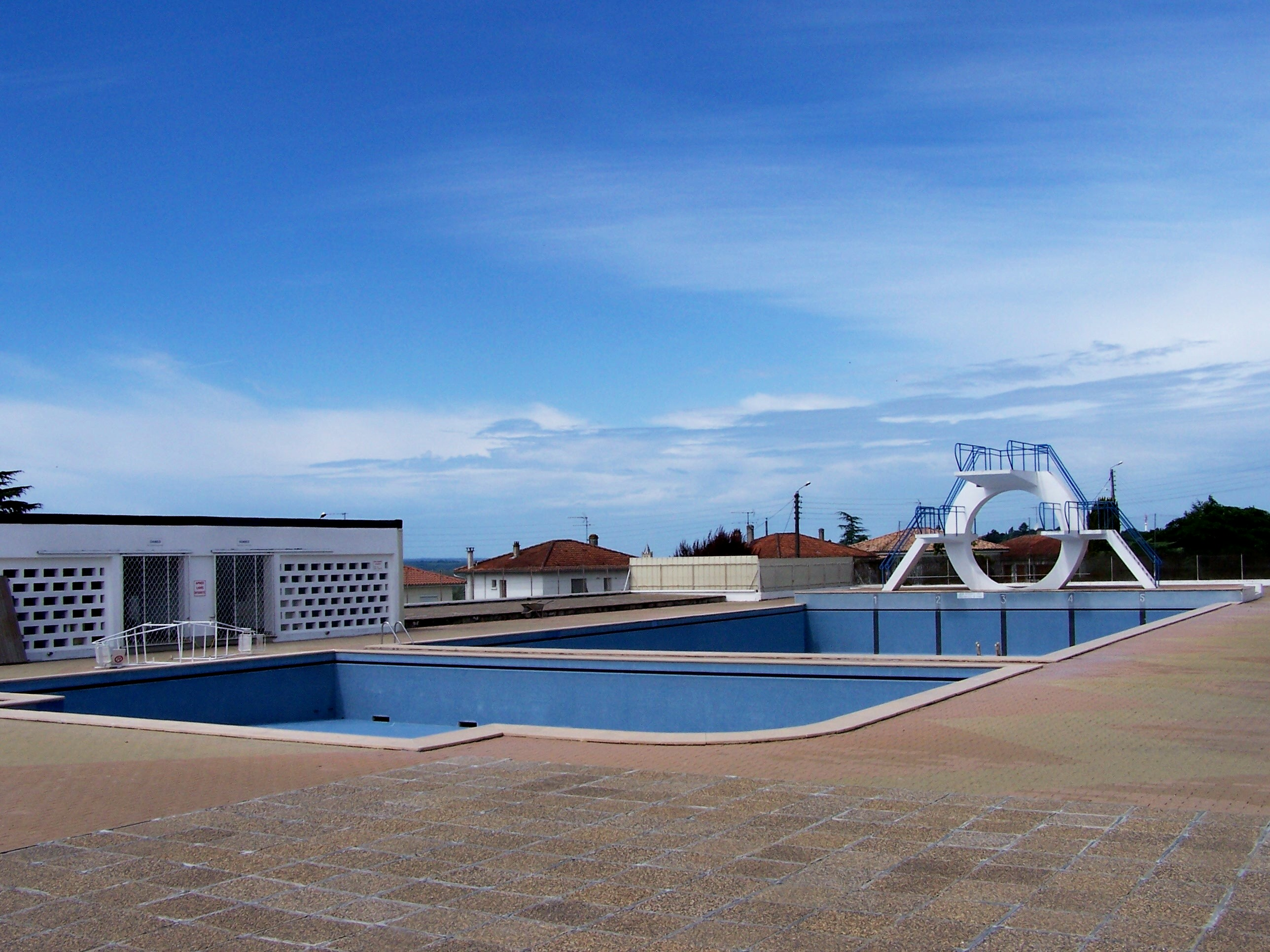 Piscine de La Réole, Gironde, France